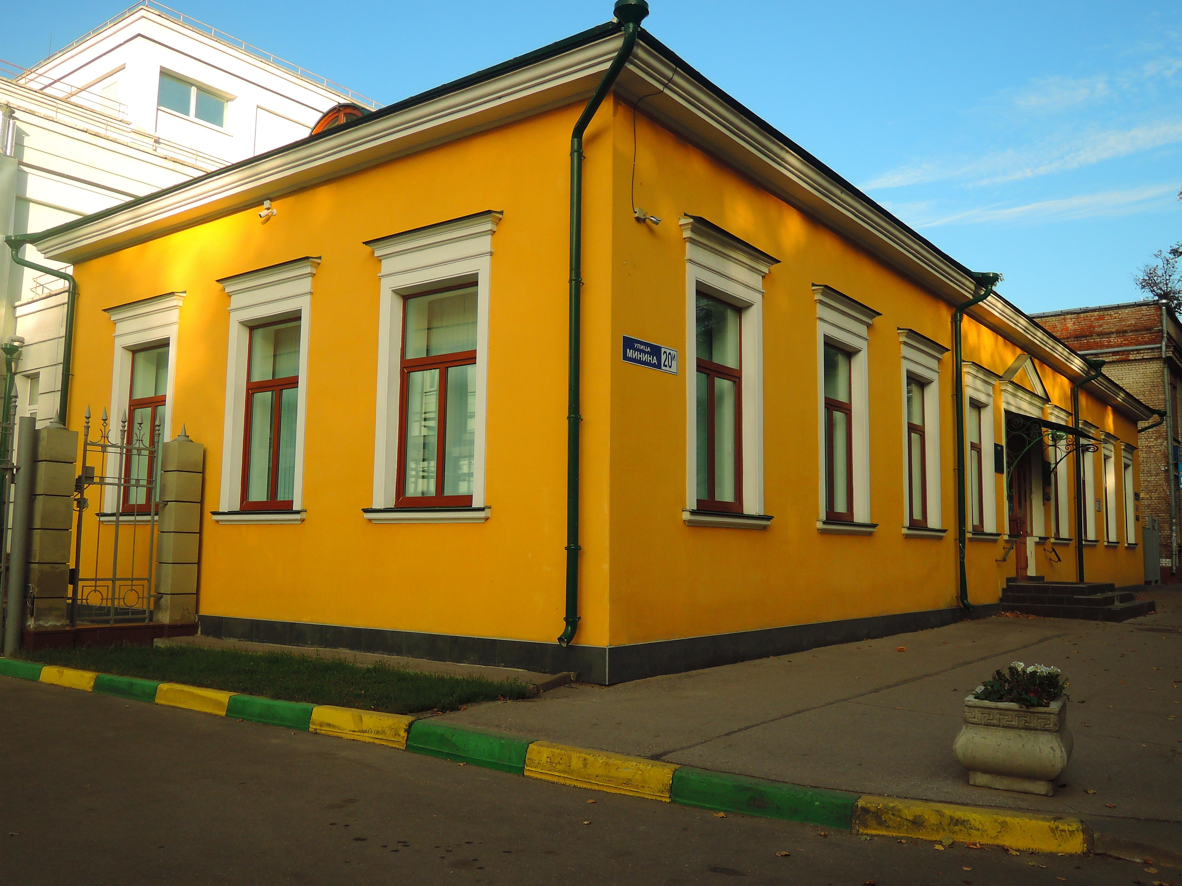 Аптечный (внутренний) флигель: улица Минина, 20/3, литер И, Нижний Новгород, Нижегородская область